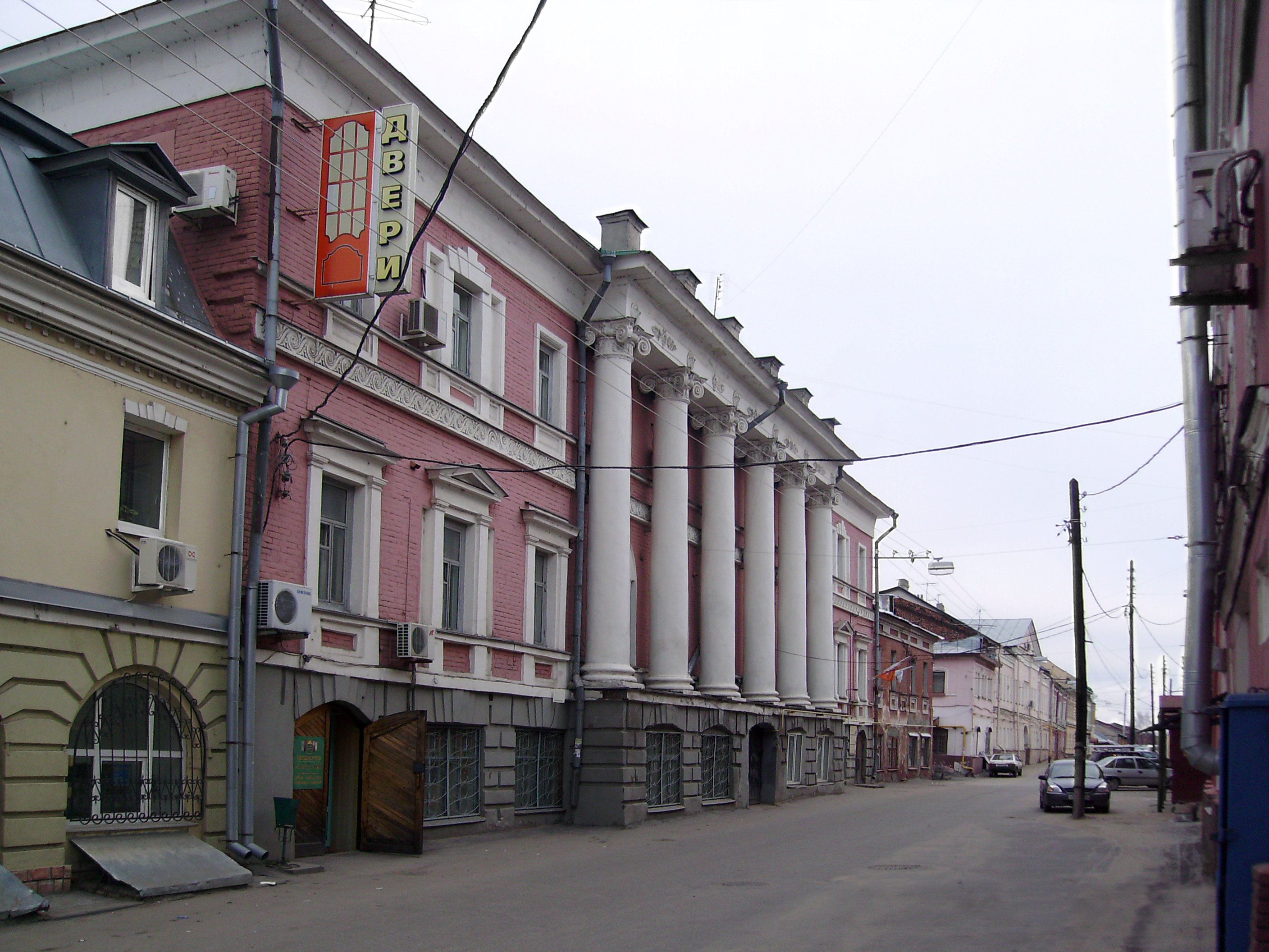 Бывший клуб-чайная «Столбы», Нижний Новгород, ул. Кожевенная, 11. Архитектор Кизеветтер Г.И.